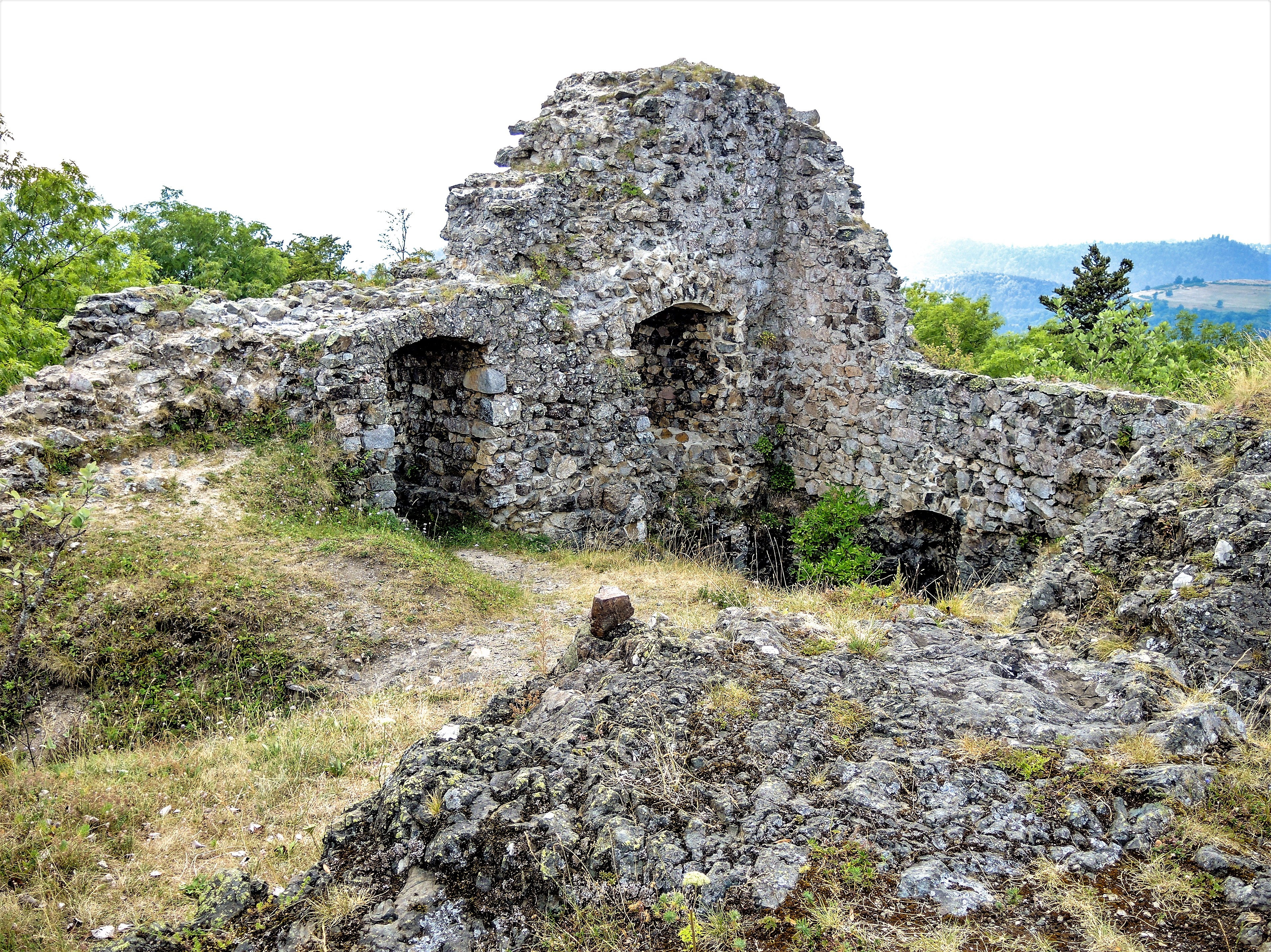 Cour intérieure des ruines du château de Freundstein. Goldbach-Altenbach. Haut-Rhin